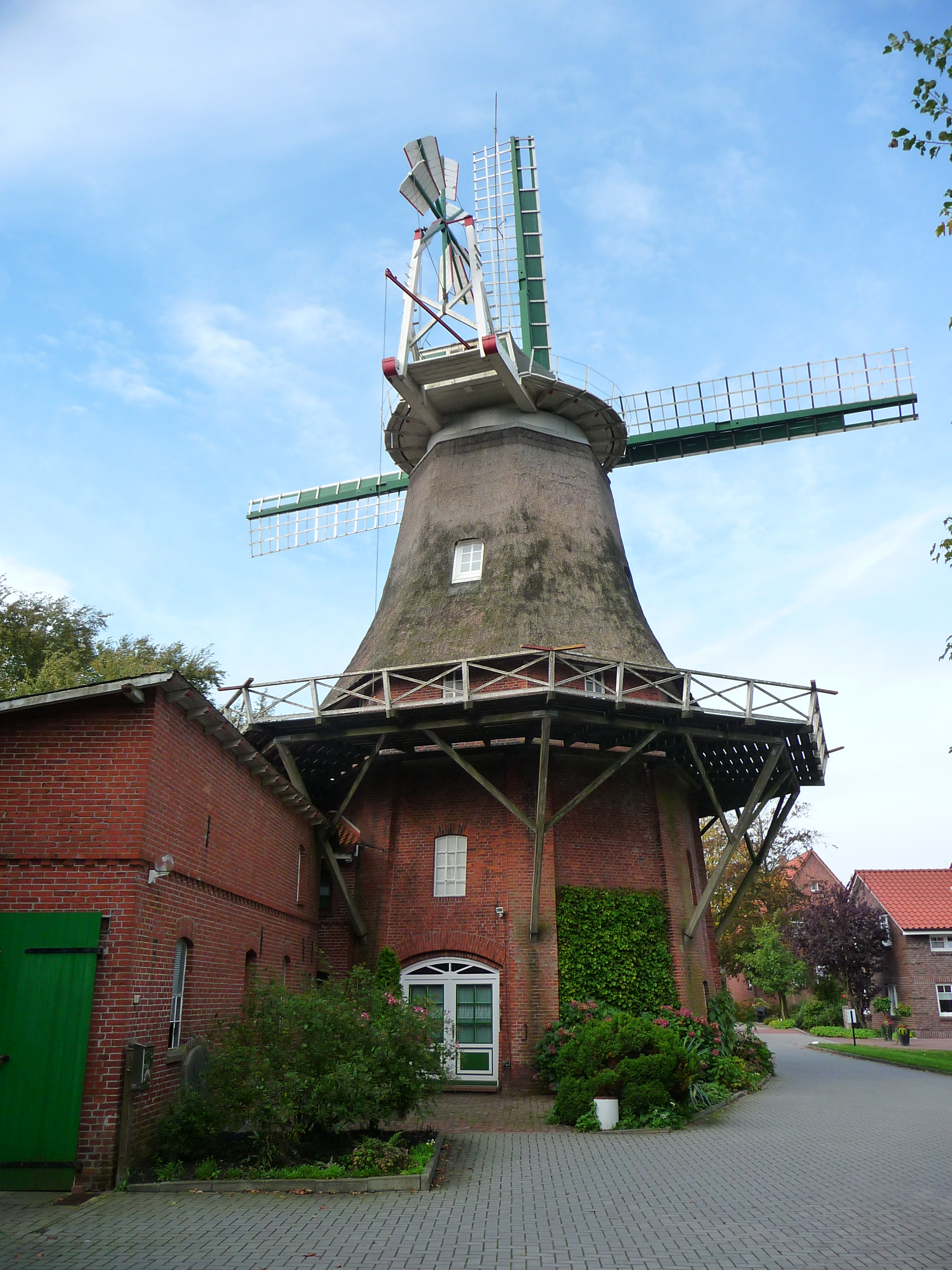 Zweistöckiger Galerieholländer von 1895/1896 mit Windrose im Marienhafener Ortsteil Tjüche (Niedersachsen, Deutschland)